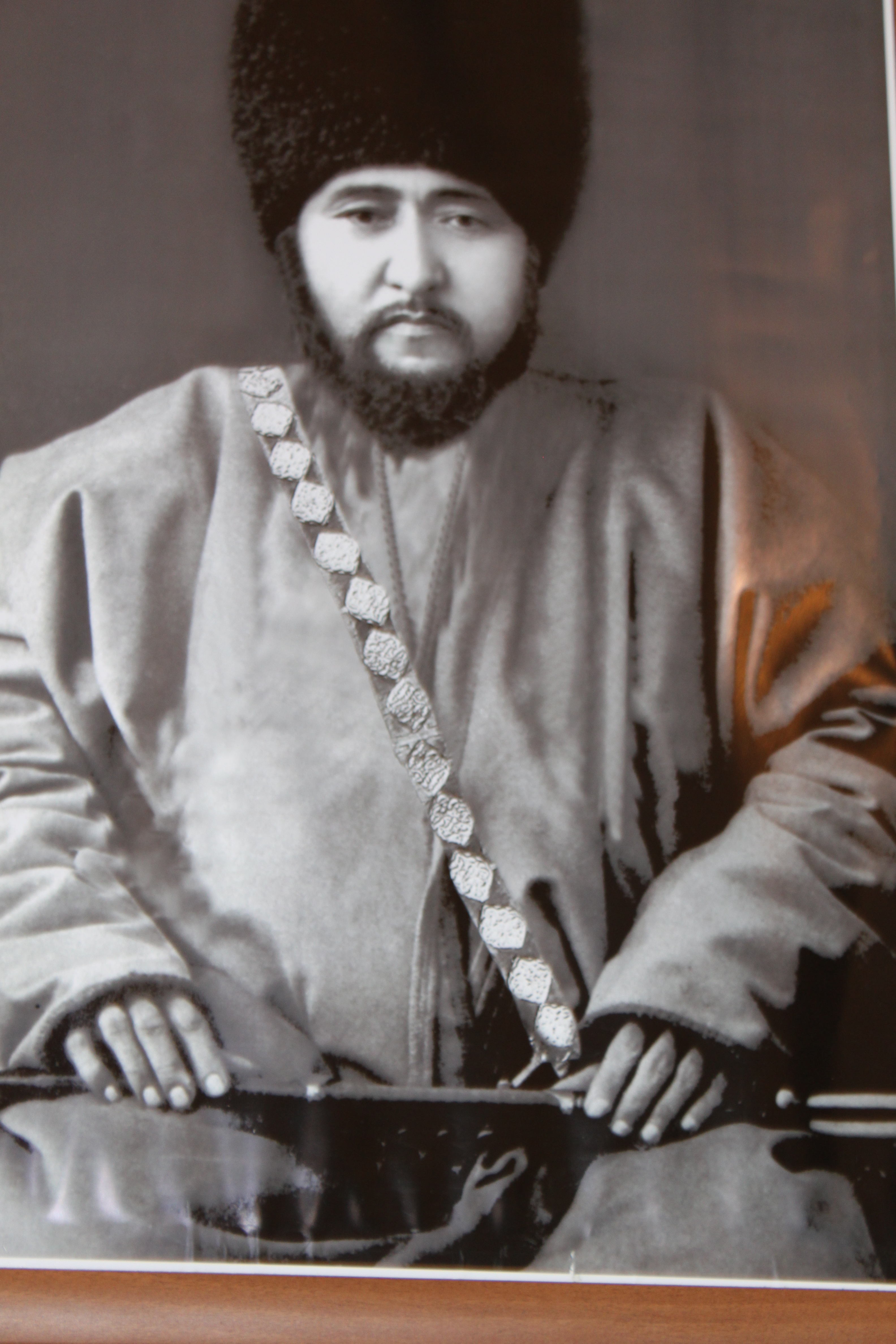 Portrait de Mohammed Rahim Khan II situé au musée de la madrasa Mohammed Rahim Khan à Khiva